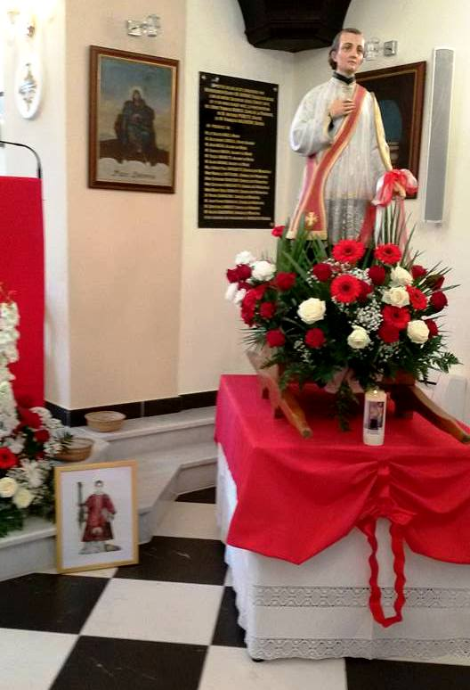 Statua Saint Césaire diacre et martyr, Eglise paroissiale Saint Césaire, Grosseto Prugna (Corse), 3 settembre 2015